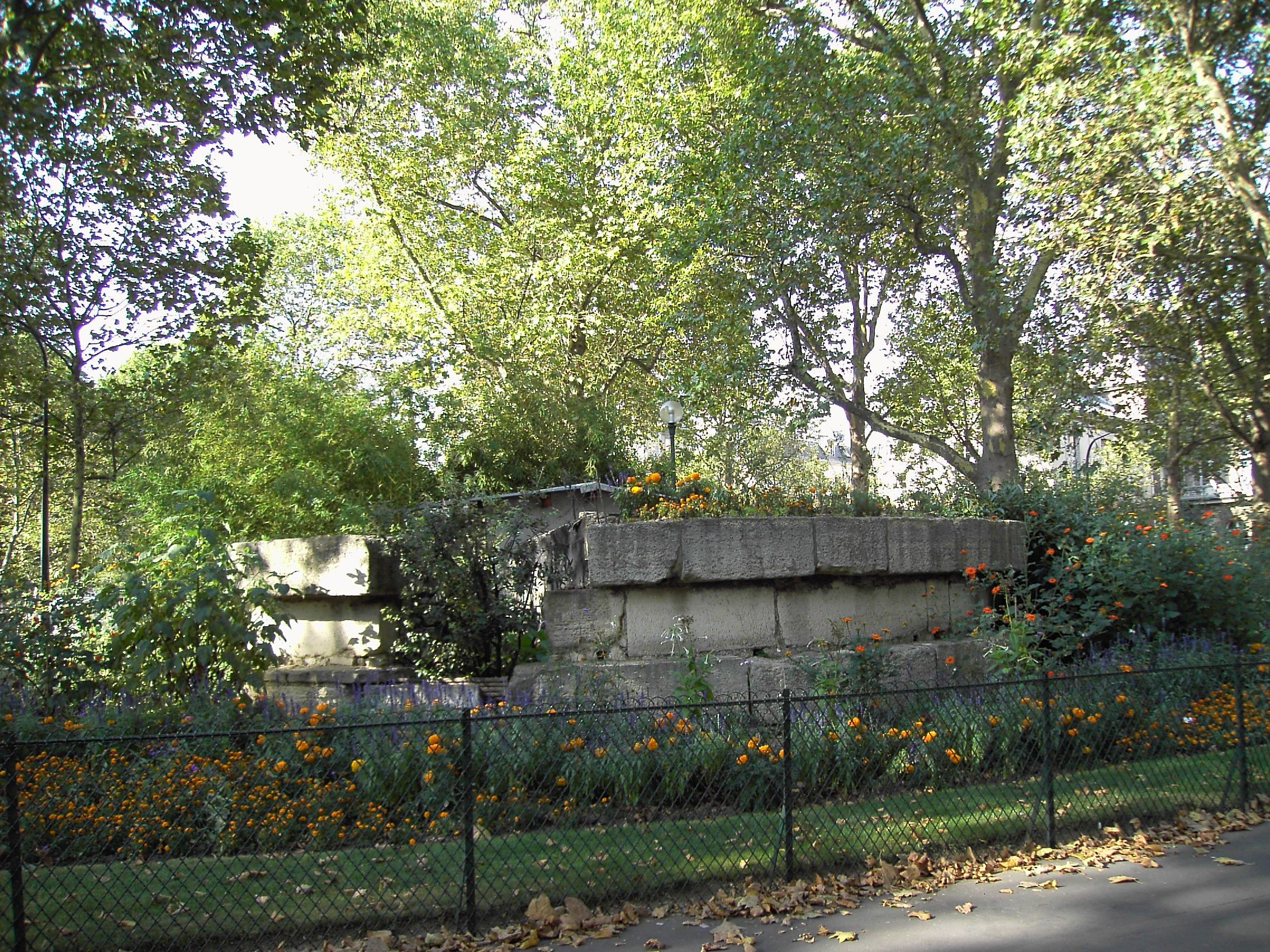 Paris, ce qui reste de la Bastille: fondements à l'Arsenal